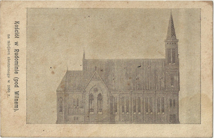 Беларуская (тарашкевіца): Рудаміна (Rudamina), вуліца Віленская (vulica Vilenskaja). Касьцёл, праект